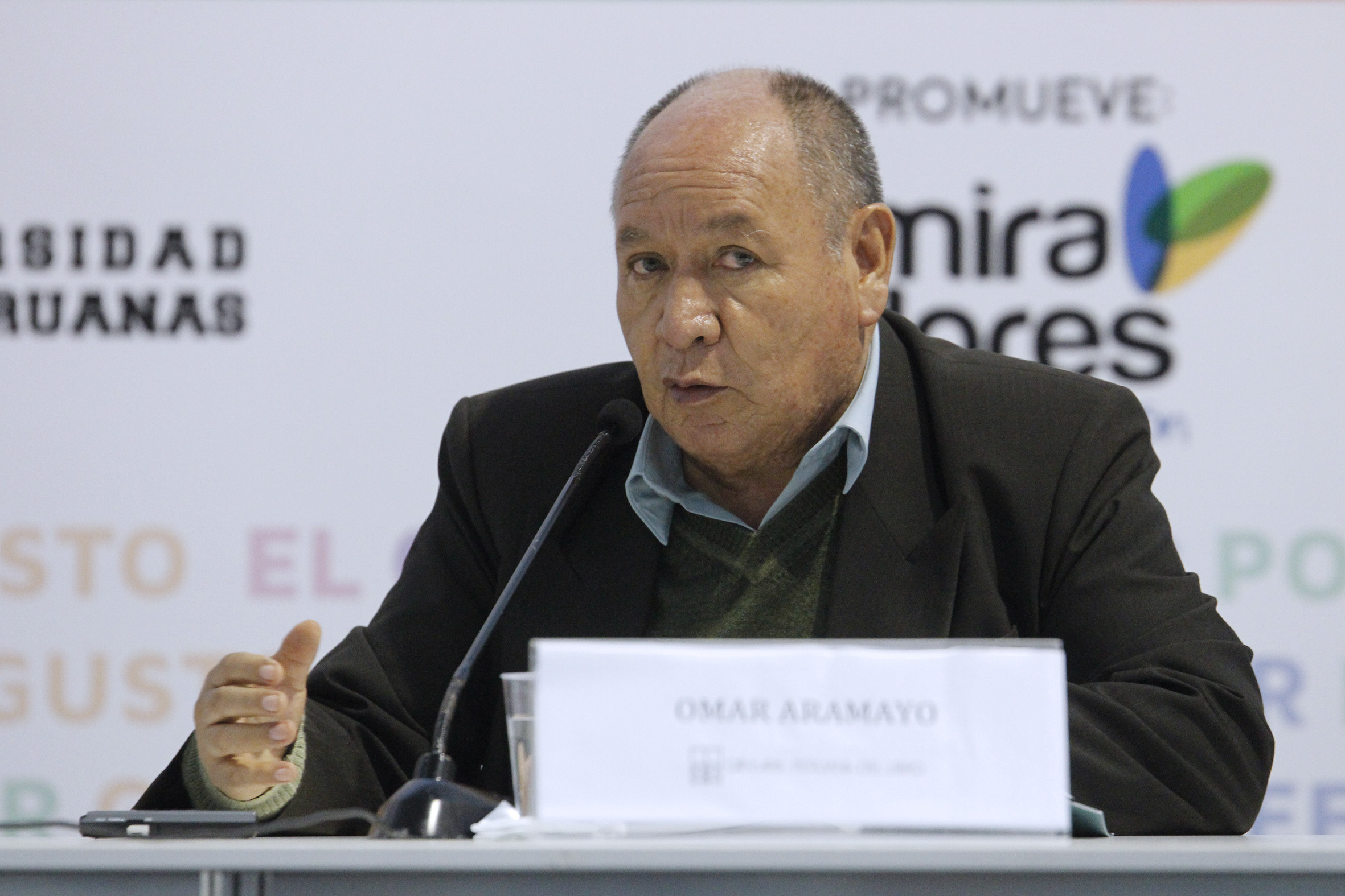 Omar Aramayo en la Feria del Libro Ricardo Palma, 2015.